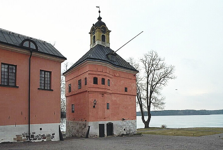 Rydboholms slott med Vasatornet och kyrkfjärden